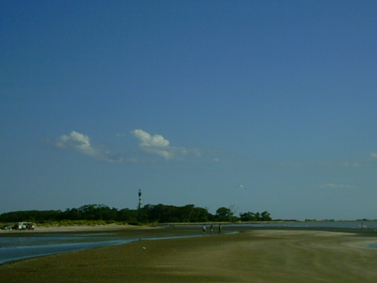 Faro San Antonio, Punta Rasa extremo norte del cabo San Antonio